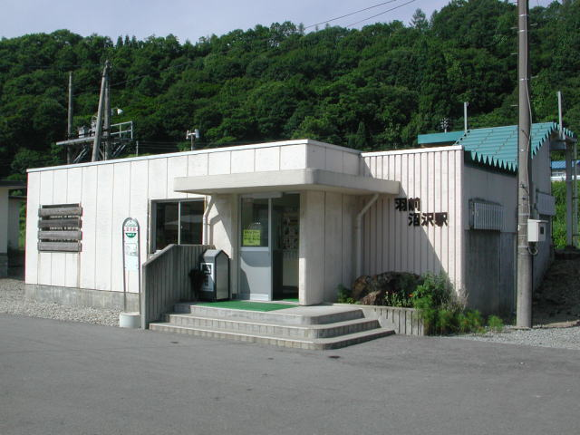 Uzen-Numazawa Station, Oguni, Yamagata, Japan